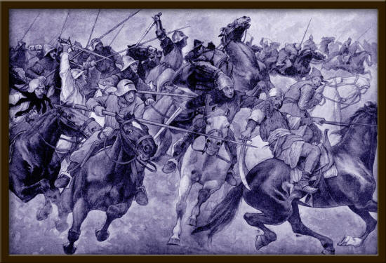 Jindřich Poděbradský vítězí nad Uhry u Uherského Brodu r. 1469